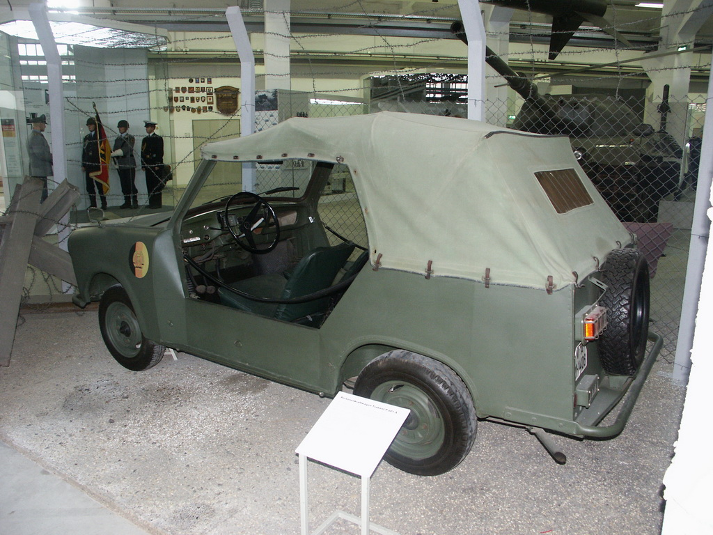 Trabant 601 Kübelwagen der NVA (im Bundeswehrmuseum Dresden)